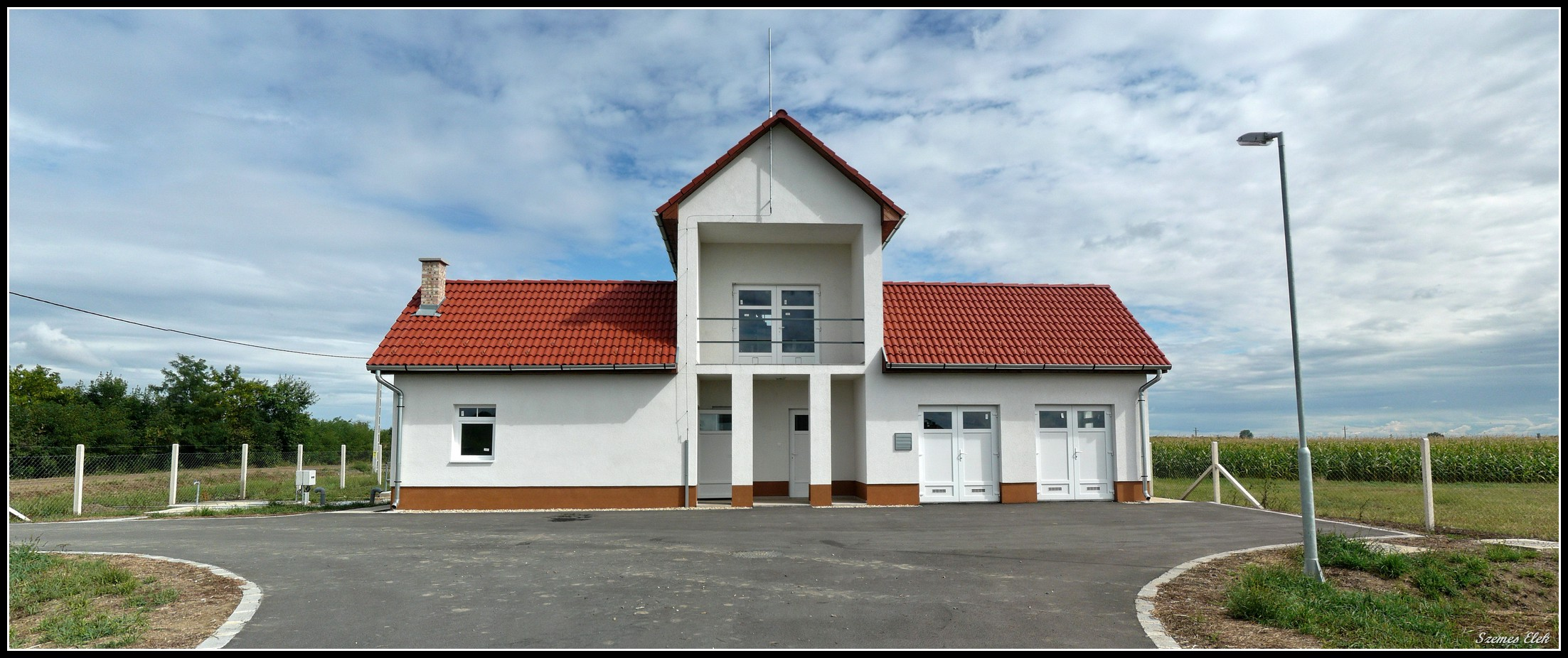 Szamoskér, Hungary